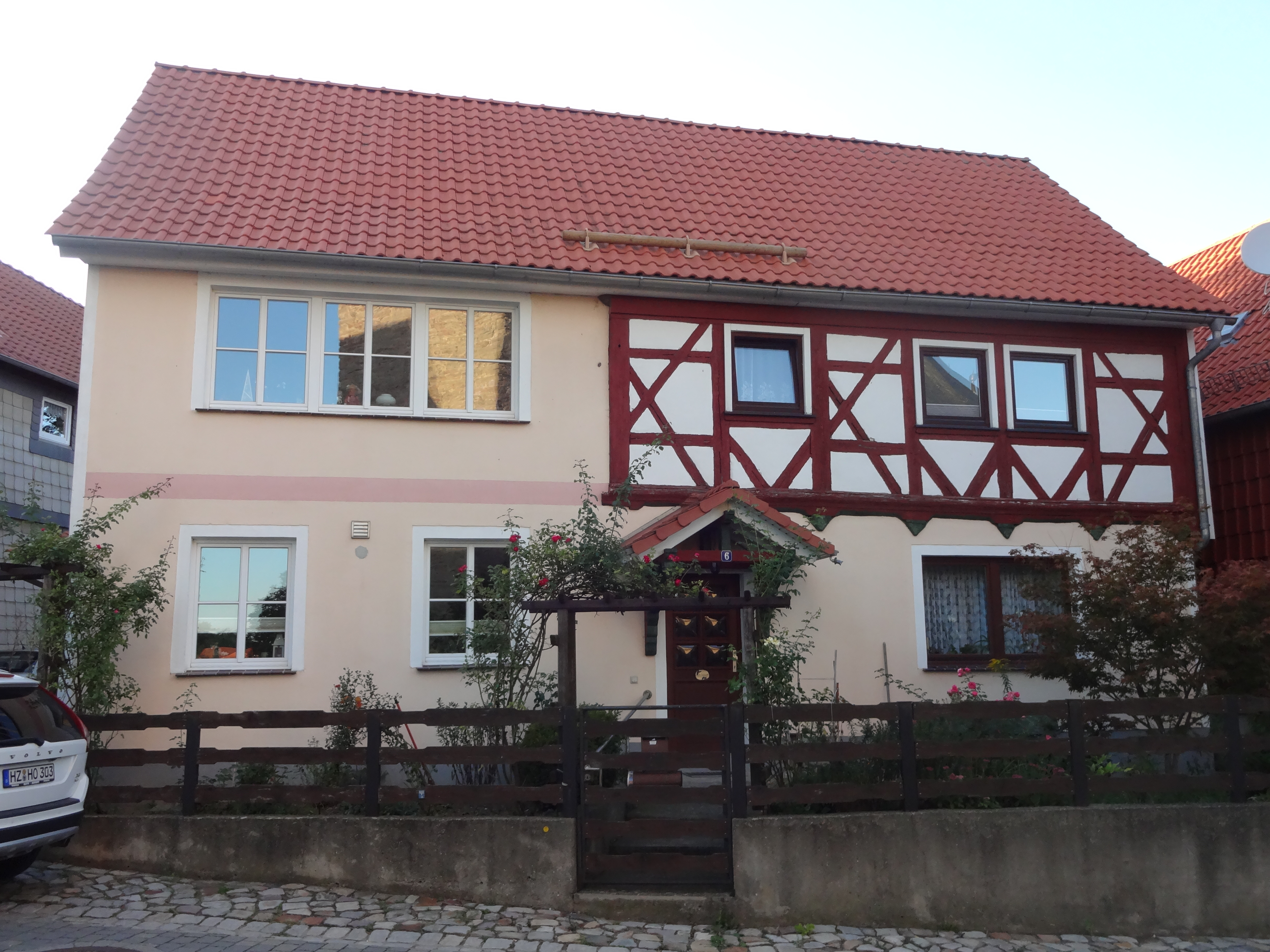 ehemals denkmalgeschütztes Wohnhaus in der Straße Oberdorf 6 in Heimburg